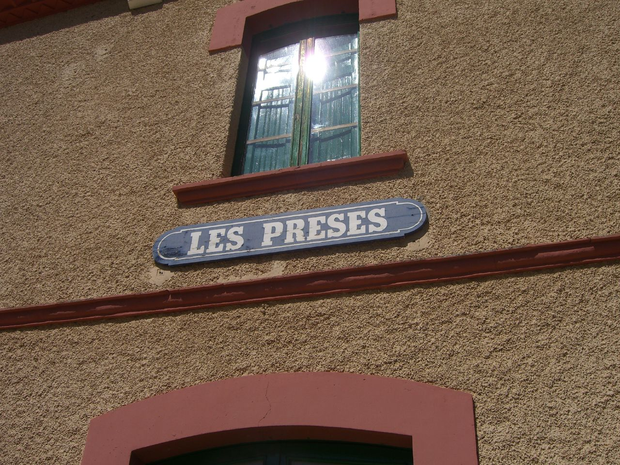 Rètol de l'antiga estació de Les Preses